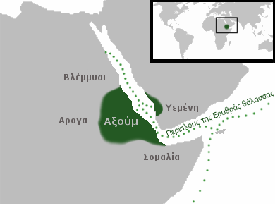 Η αυτοκρατορία του Αξούμ